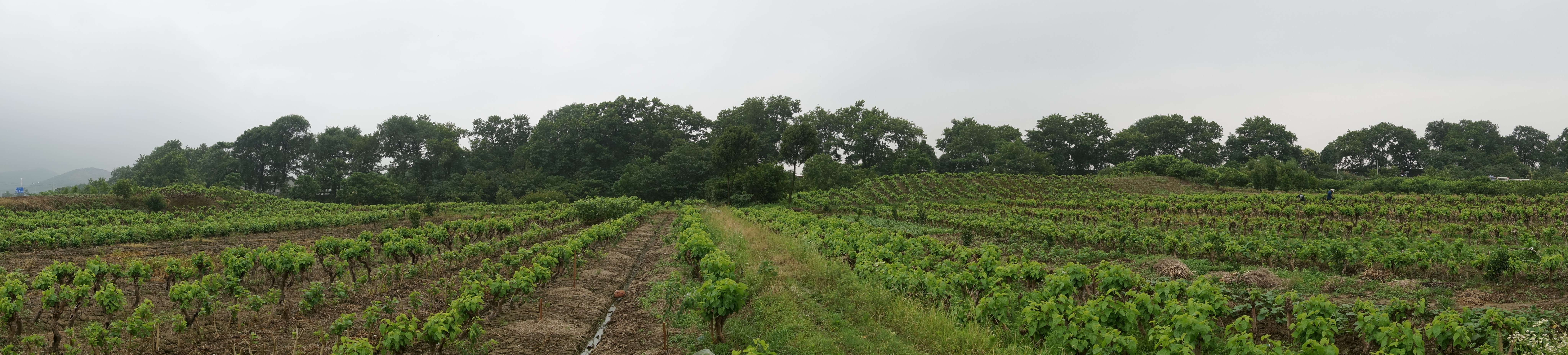 石墩巡检司城遗址，自城内望南城墙。